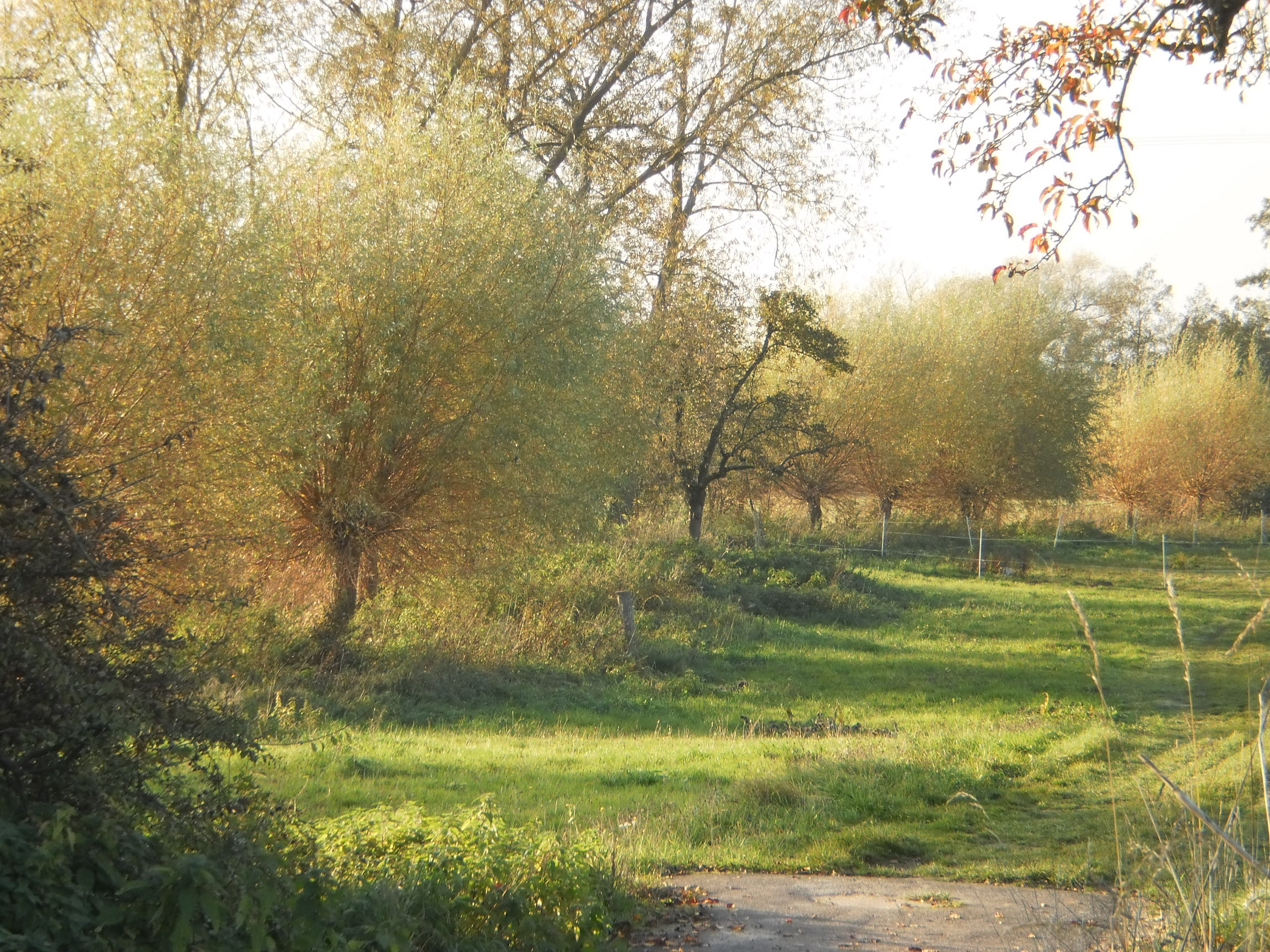 Kopfweiden an der Zwester Ohm direkt an der ehemaligen, heute zur Kreisstrasse rückgebauten Bundesstrasse 3 bei Sichertshausen.